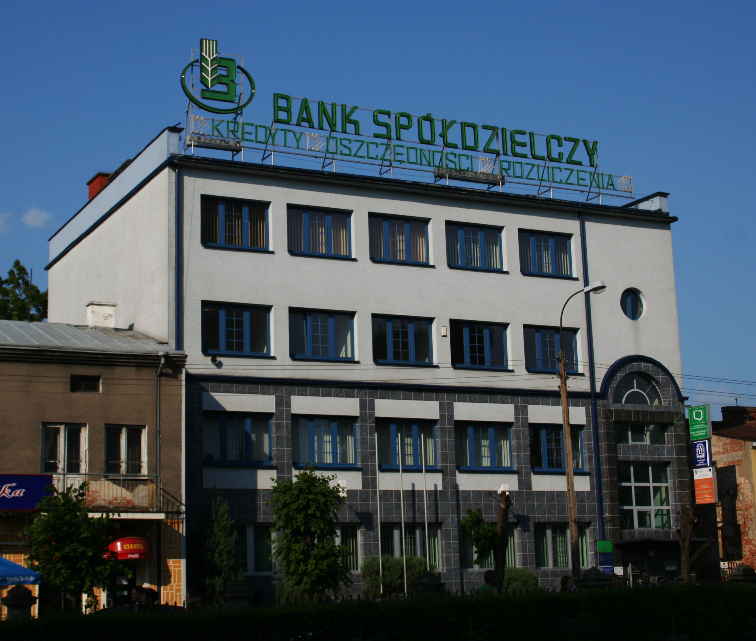 budynek Banku Spółdzielczego w Augustowie